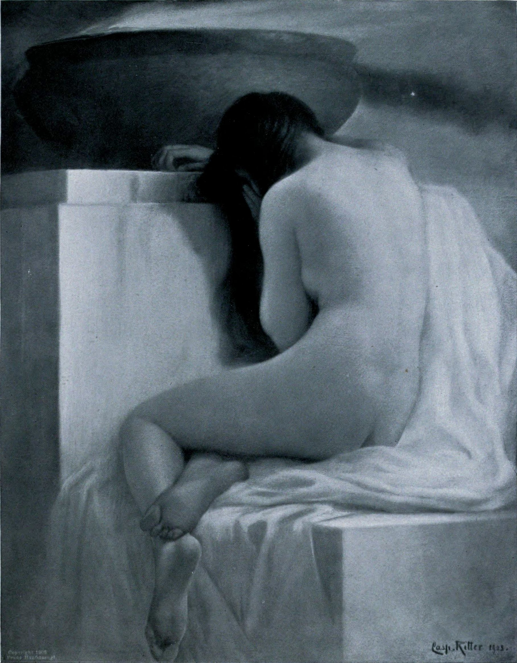 Das Opfer